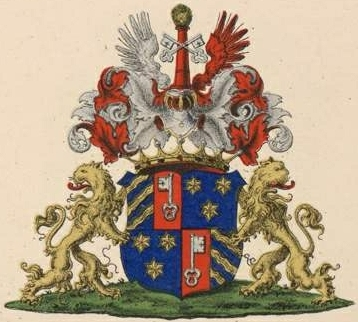 Osten gen. Sackeni suguvõsa parunivapp